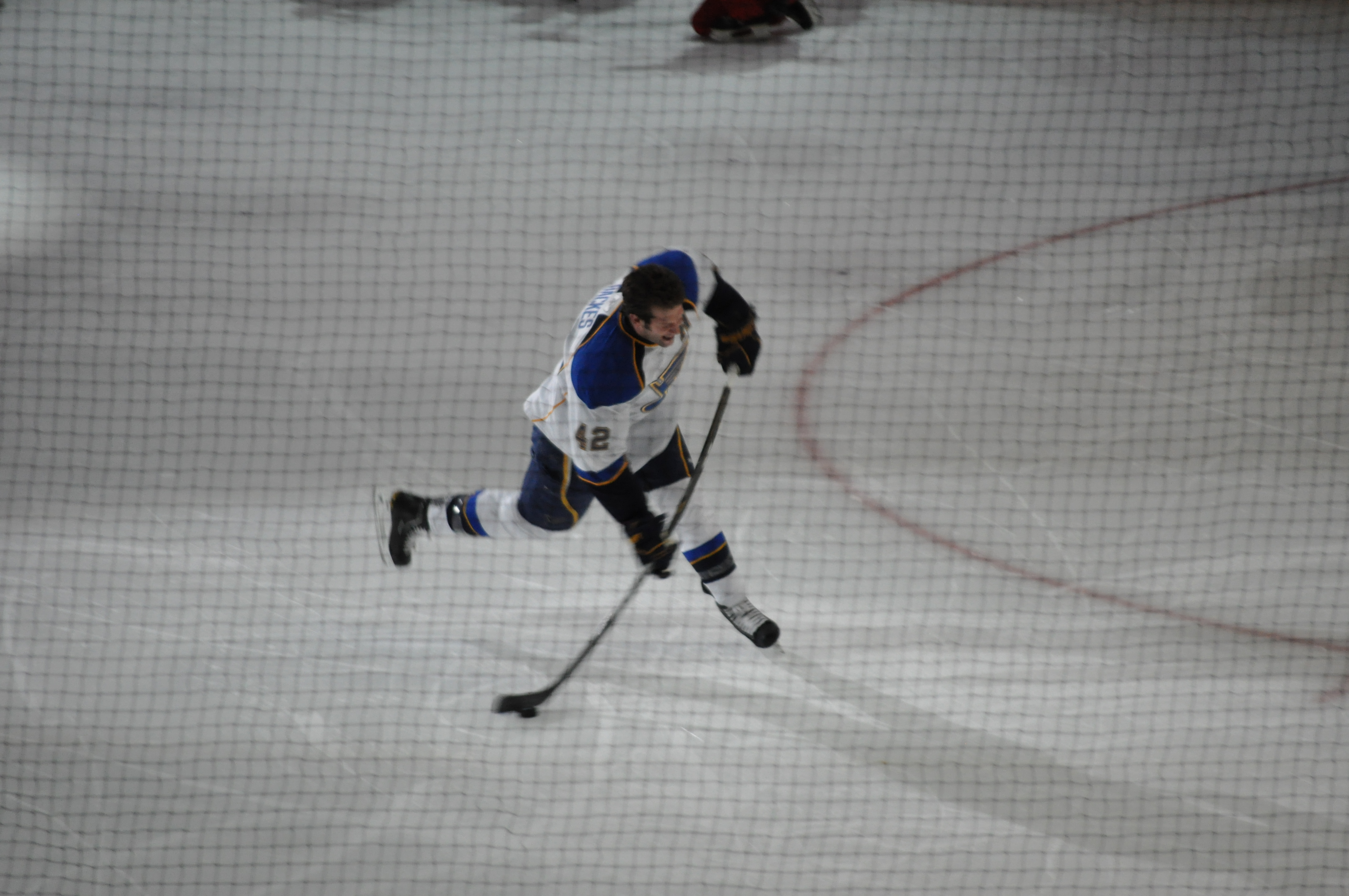 Hardest Shot, David Backes